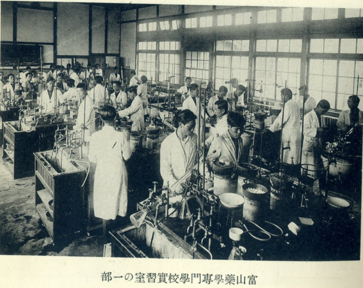 富山薬業専門学校実習室の一部